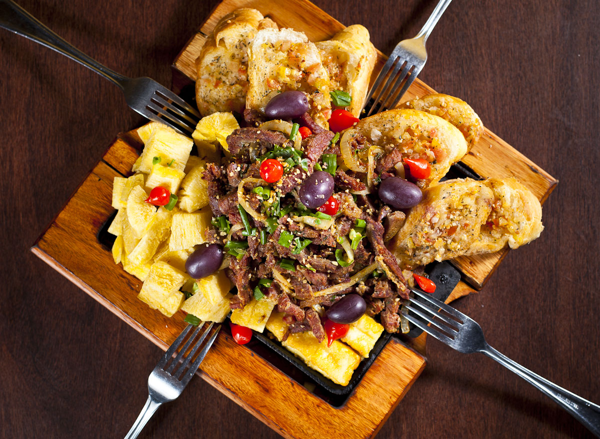 SÃO PAULO, SP, BRASIL, 08-04-2013, 17h00: Porção de Carne Seca do restaurante Feijão do Norte. (Foto: Zé Carlos Barretta/Folhapress COMIDA)